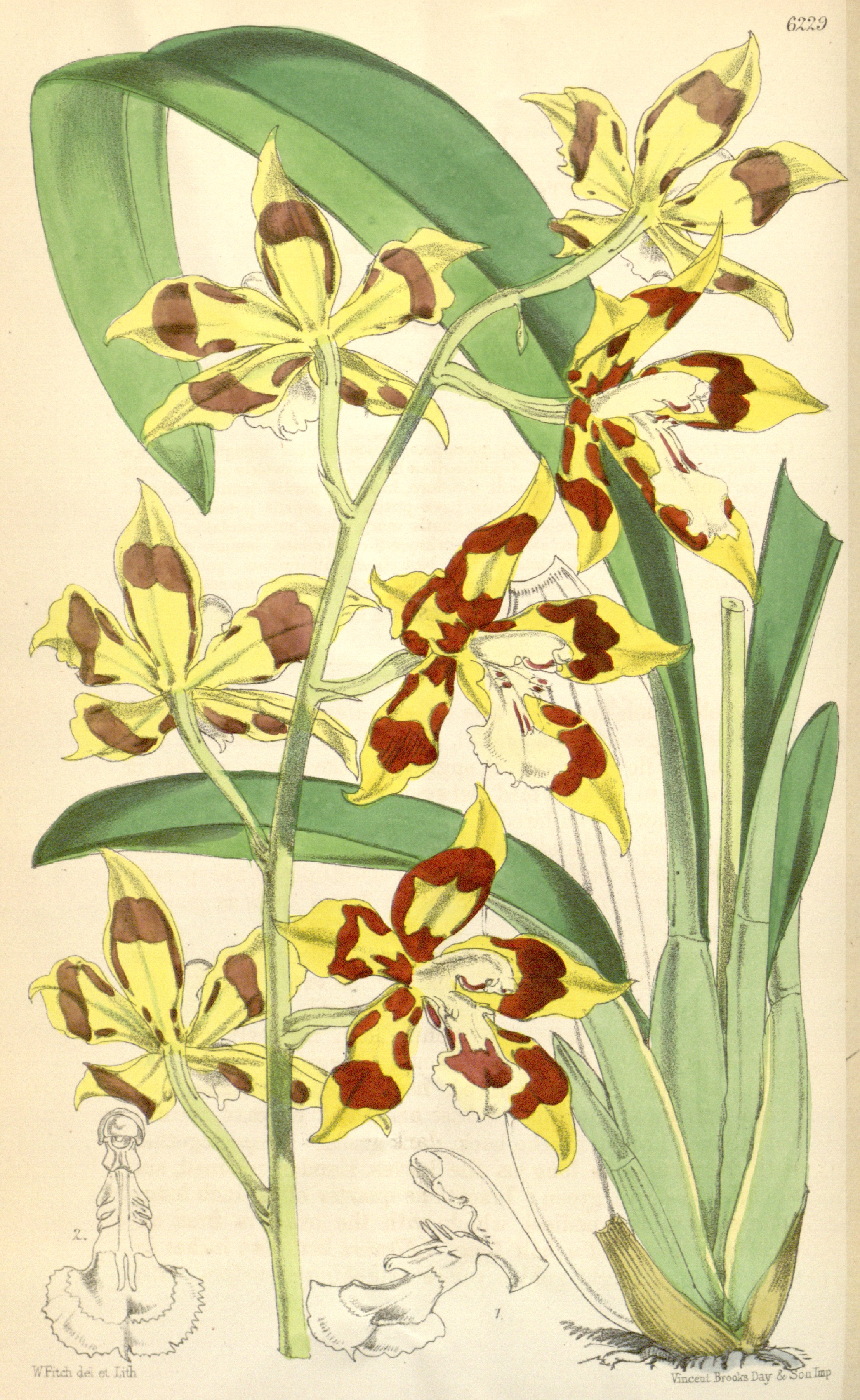 Illustration of Odontoglossum praenitens